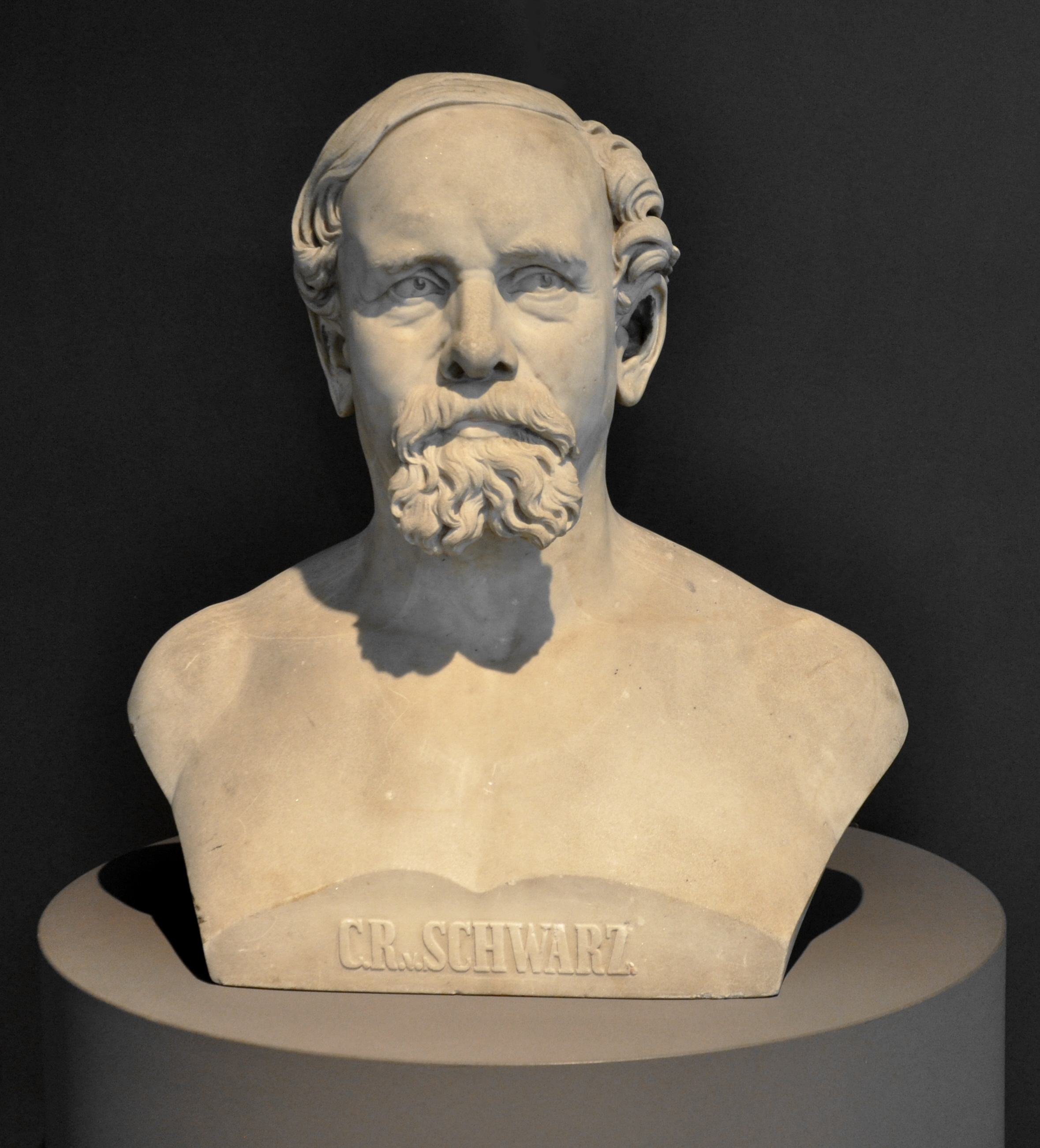 Franz Xaver Pönninger: Büste Carl von Schwarz, Wien 1871, Carrara-Marmor, Salzburg Museum Inv. 40/58, Schenkung des Magistrats von Salzburg 1957